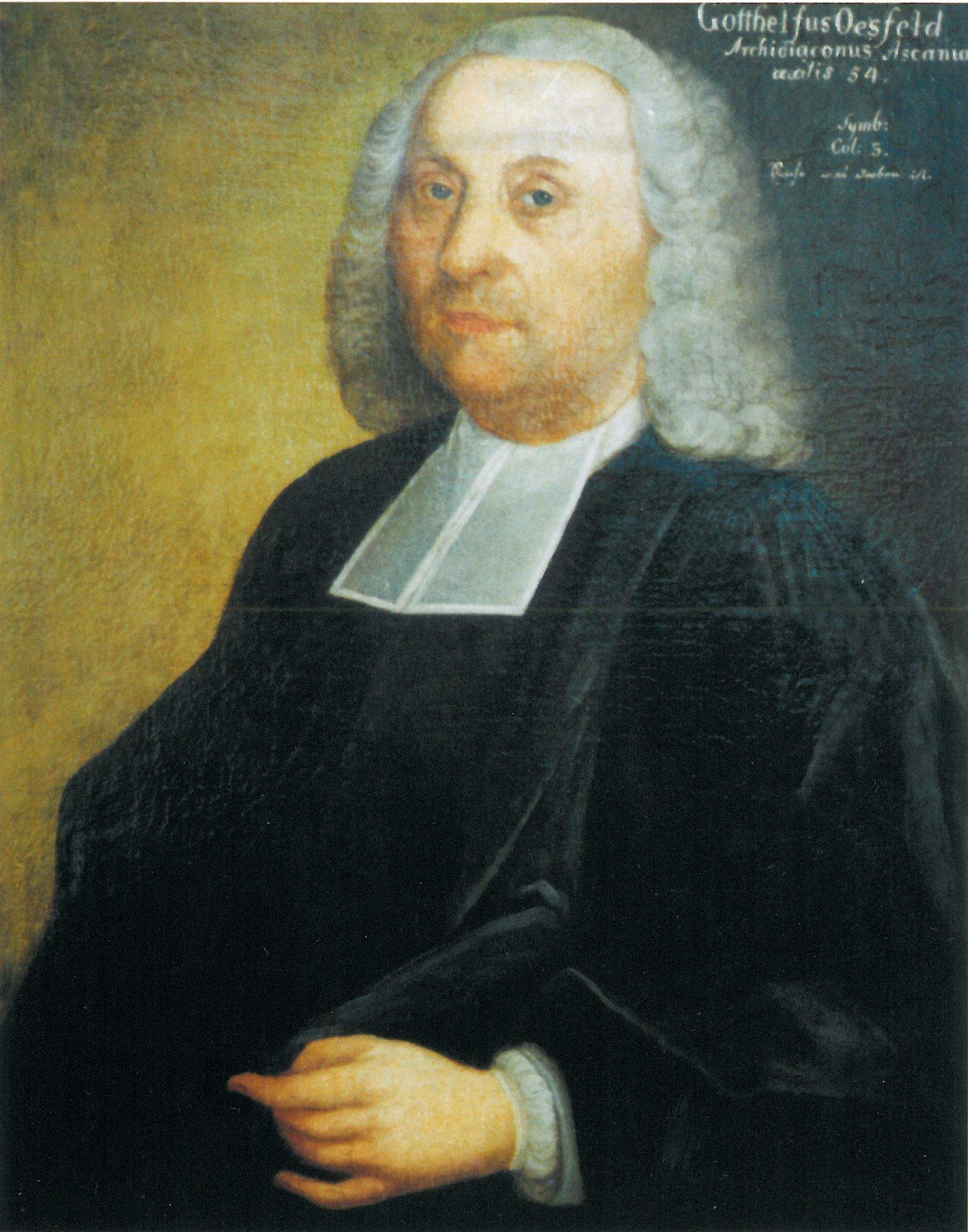 Gotthelf Friedrich Oesfeld (1735-1801), deutscher evangelischer Pfarrer in Scheibenberg und Lößnitz, Chronist des Erzgebirges.